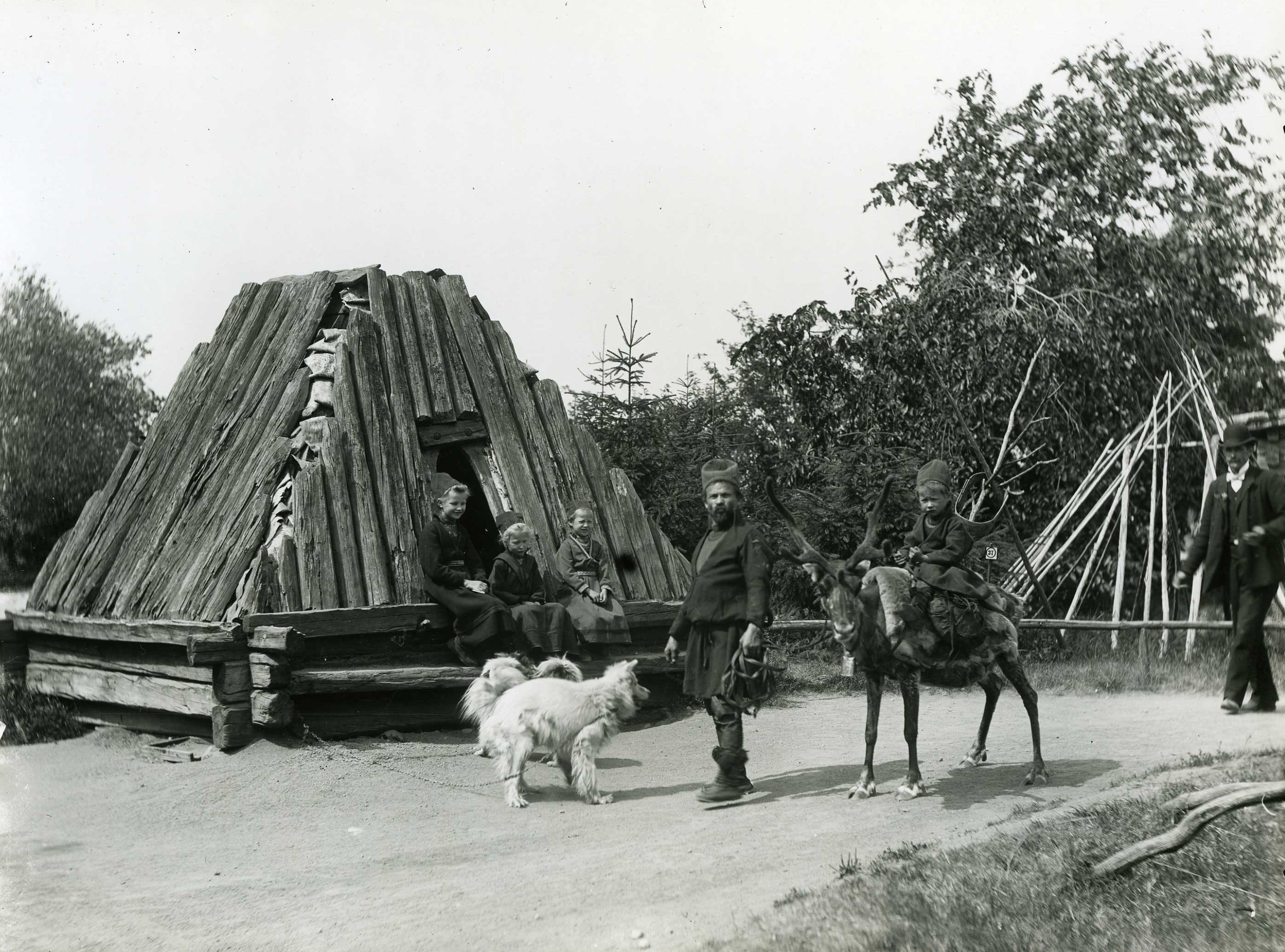 MOTIV Samisk familj vid samevistet på Skansen. En man leder en ren med liten pojke på ryggen. MOTIV-ÄMNESORD Djur : Husdjur , Djur : Sällskapsdjur , Minoriteter : Samer , Barn , Man , Kläder : Folkdräkt Boende